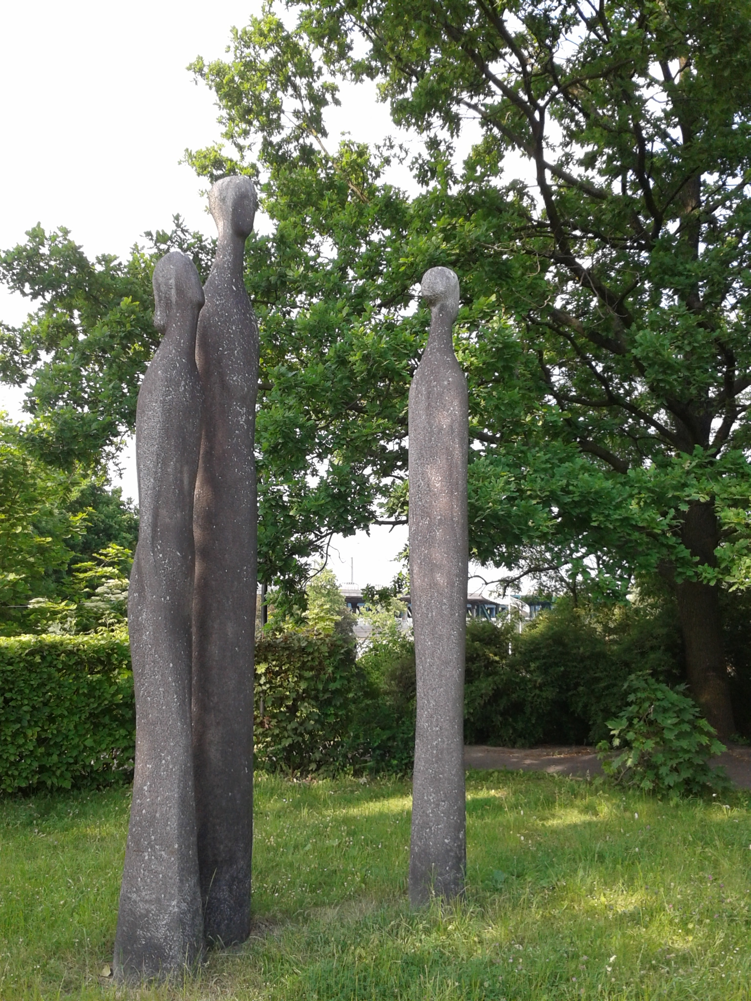 Rzeźba Zofii Woźnej "Samotność (Trzy cienie)" / 1965/ w Parku im. R. Traugutta w Warszawie, wykonana z trzech kolumn rozebranego Pałacu Kronenberga